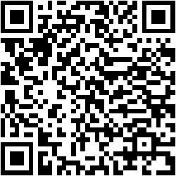 "Hamının redaktə edə biləcəyi açıq ensiklopediya olan Vikipediyaya xoş gəlmişsiniz" - mətnin QR kodu